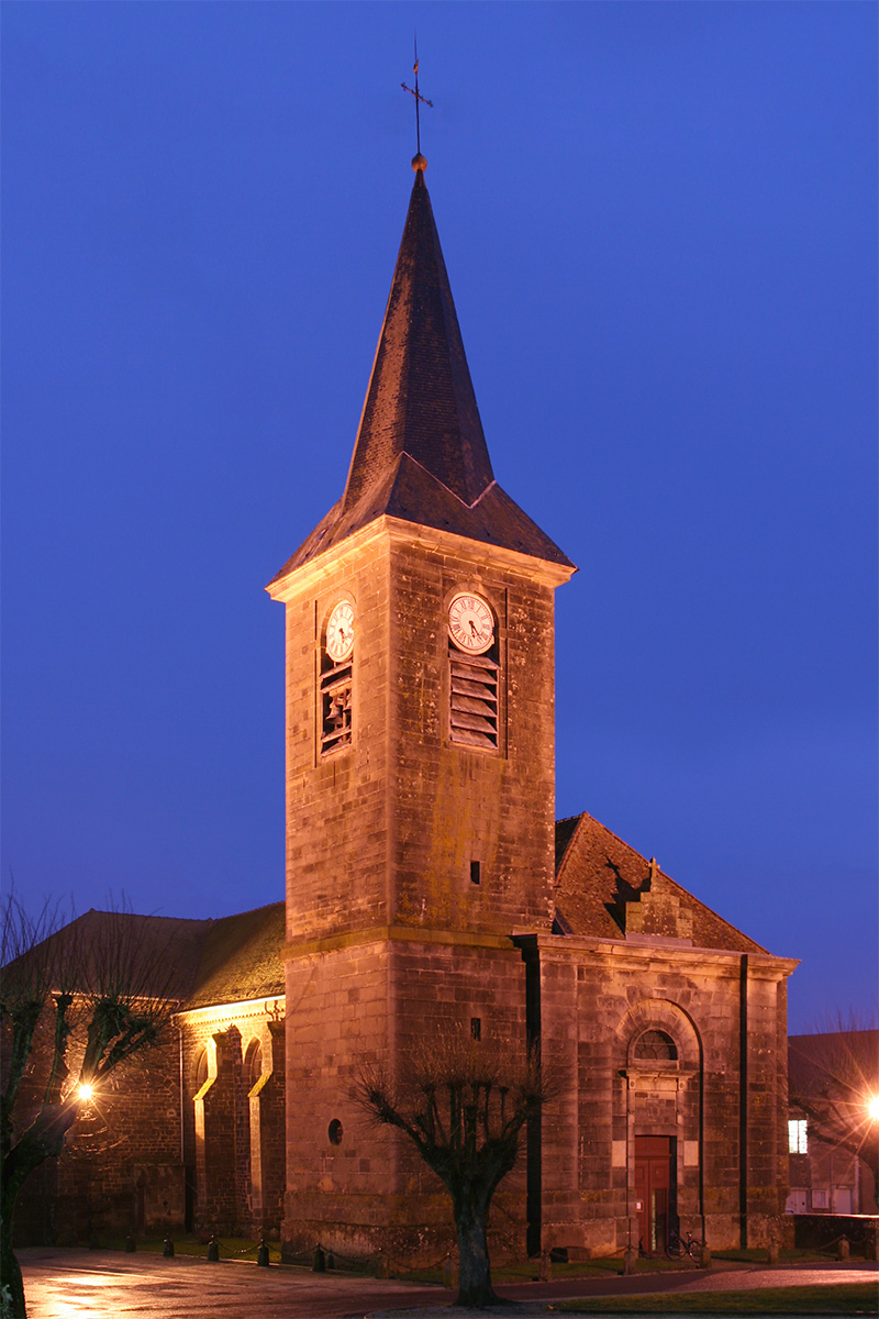 Eglise paroissiale Saint-Gengoulf, de Terre-Natale, Champagne-Ardenne, France. . Object location47° 53′ 45.96″ N, 5° 37′ 15.96″ E